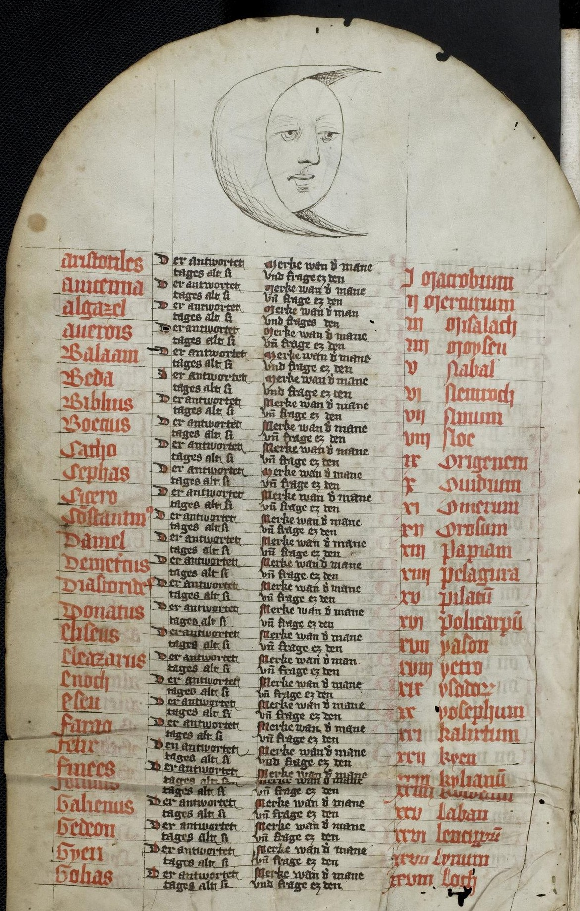 Codex Palatinus germanicus 3, Blatt 1r der Handschrift: "Mondbuch".